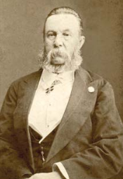 Аляксандр Максімавіч Семянтоўскі-Курыла